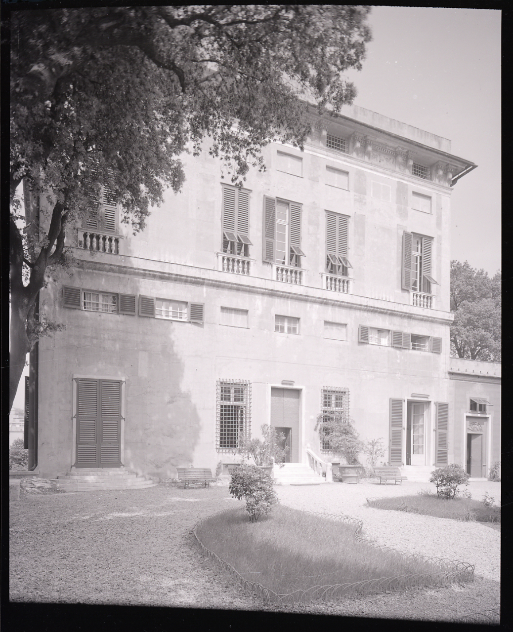 Servizio fotografico : Genova, 1963 / Paolo Monti. - Buste: 3, Fototipi: 3 : Negativo b/n, gelatina bromuro d'argento/ pellicola ; 10x12. - ((Serie costituita da 3 buste sciolte di negativi identificati con i nn.: 6284bis, 6285, 6352. - Il negativo identificato con il numero 46397 è stato realizzato per Zodiac. - Occasione: Documentazione per la pubblicazione: Italia Nostra (a cura di), "Le ville genovesi", catalogo della mostra, Genova 1962, Genova, Comune di Genova, 1967. - Fonte: Monografia di Italia Nostra (a cura di): Le ville genovesi, catalogo della mostra, Genova 1962, Genova, Comune di Genova (1967). - Fonte: Lettera di Paolo Monti: I. Carteggi/ Genova - Enrico (1963-1966), presso Archivio Paolo Monti. Camicia con documenti dattiloscritti e manoscritti vari relativi al lavoro eseguito per Italia Nostra: preventivi, lettere, inventari. - Fonte: Rubrica di Paolo Monti: Archivio fino 1-4-1961/ 31-3-1963 (1961-1963), presso Archivio Paolo Monti. - Fonte: Agenda di Paolo Monti: R 1 - Monti/ 1 aprile 1963 - 6 giugno 1964/ 6000-8193 (1963-1964), presso Archivio Paolo Monti